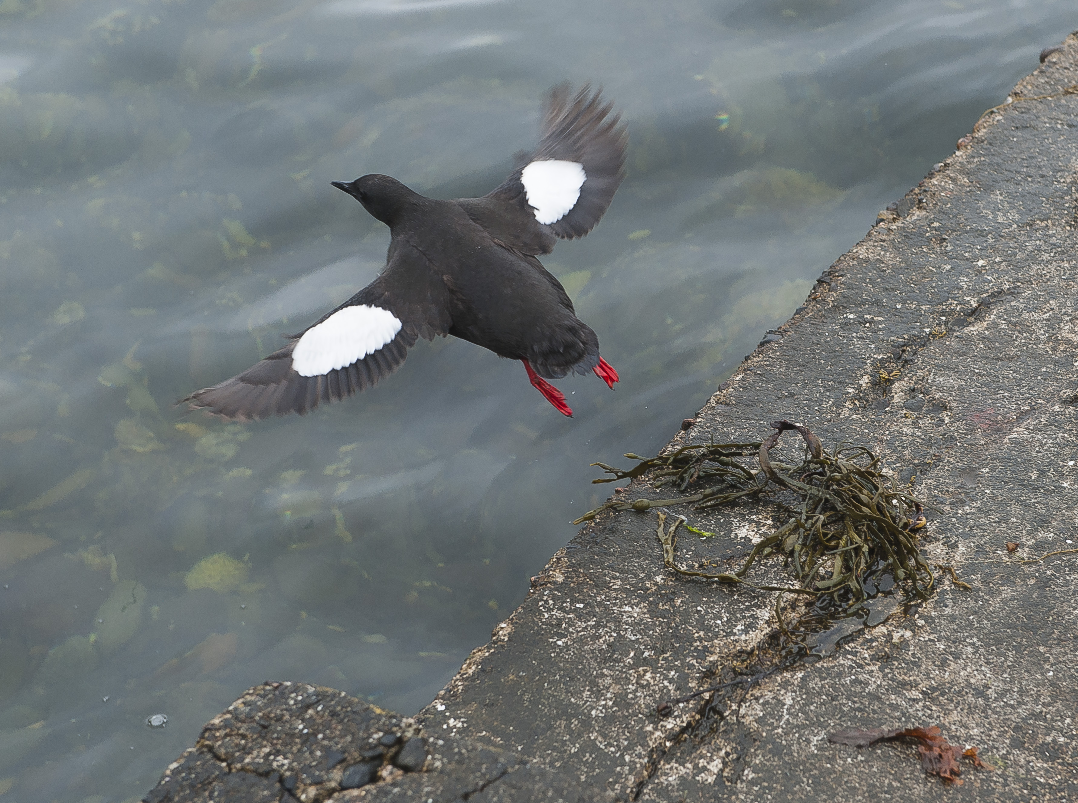 Gryllteiste (Cepphus grylle), Oban, Schottland